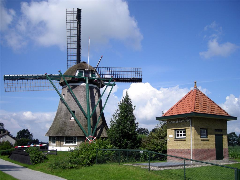 Molen De Hersteller en gemaal De Grie categorie:Afbeelding molen